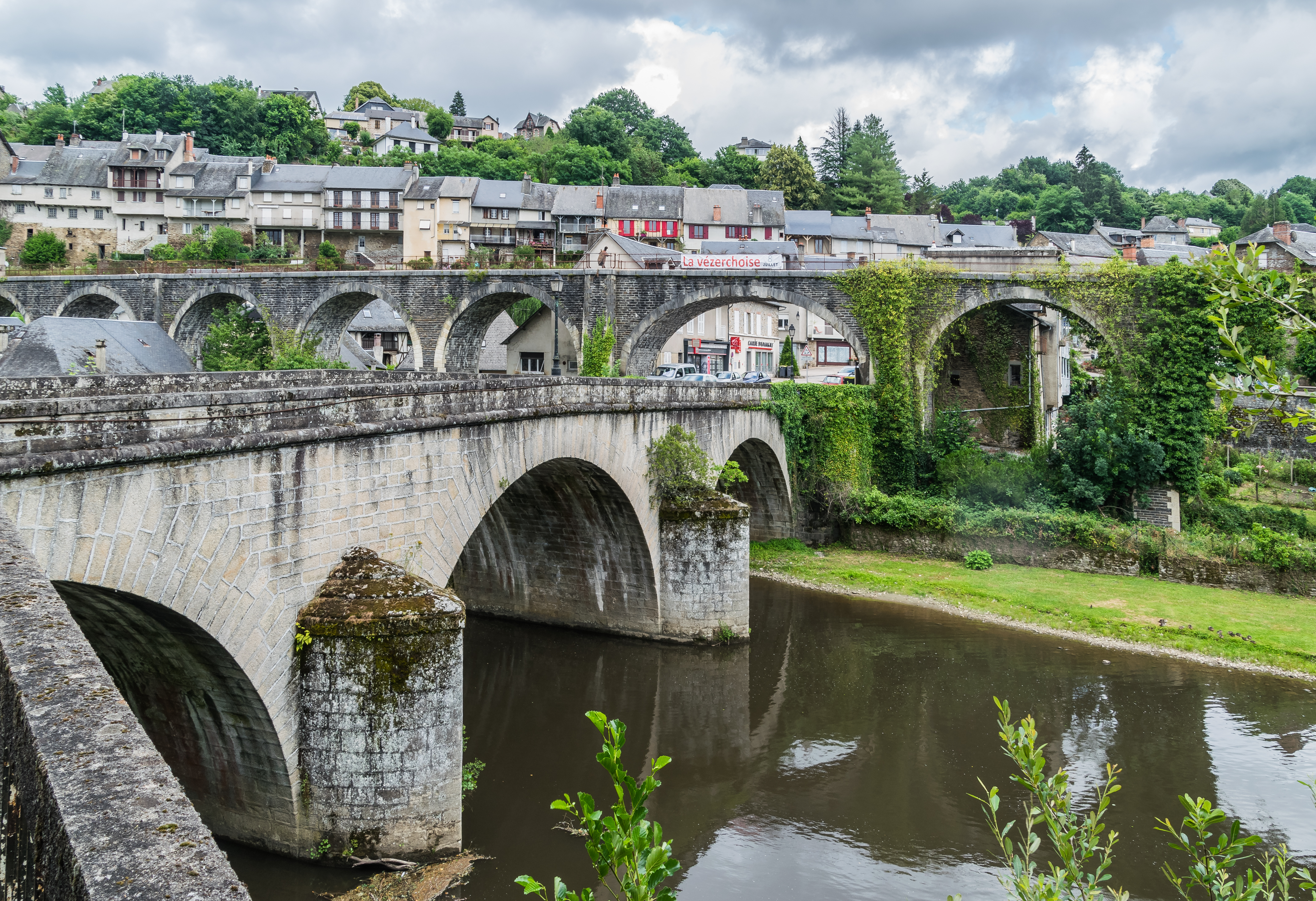 Pont Turgot sur la Vézère à Uzerche, Corrèze, France .